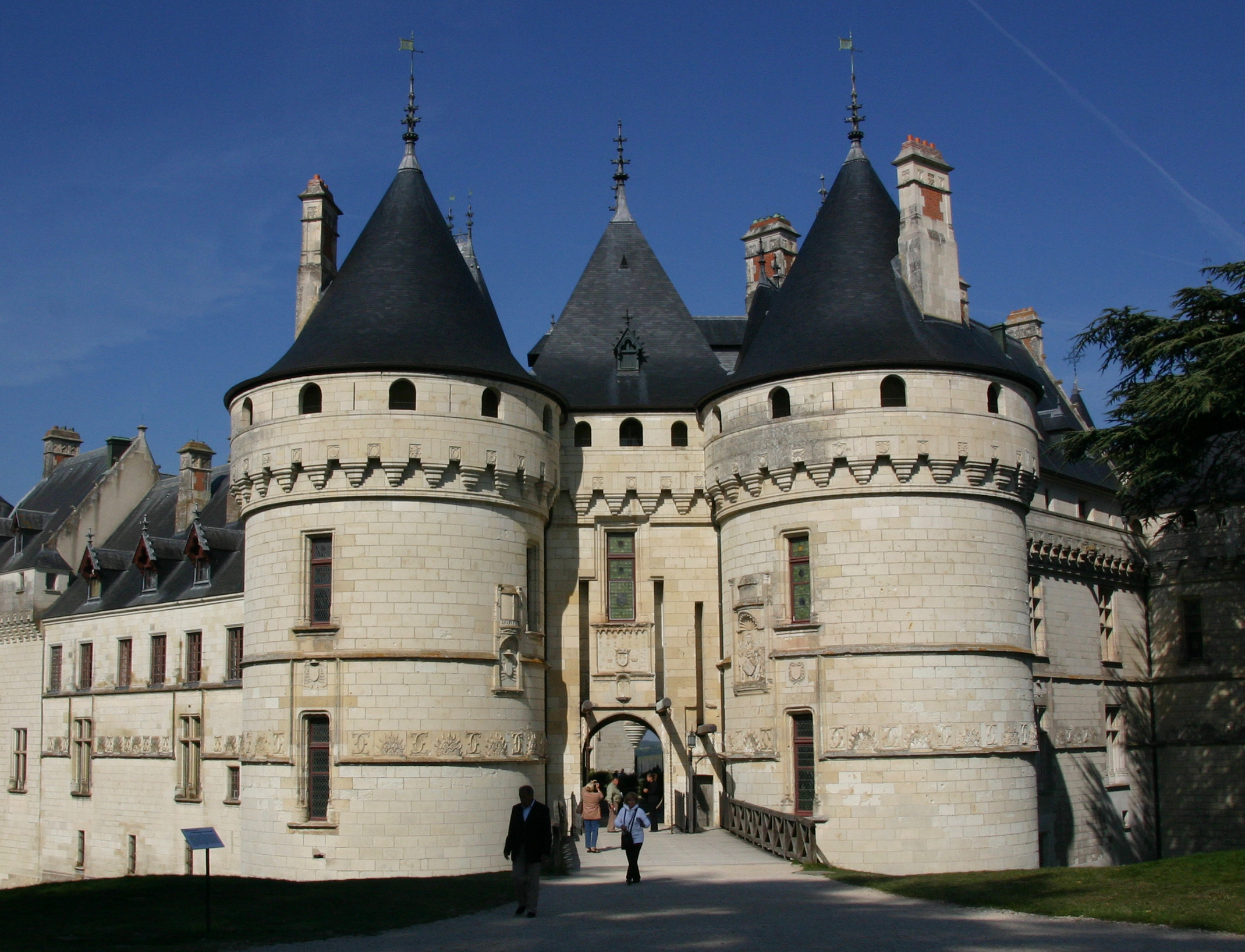 Château de Chaumont-sur-Loire